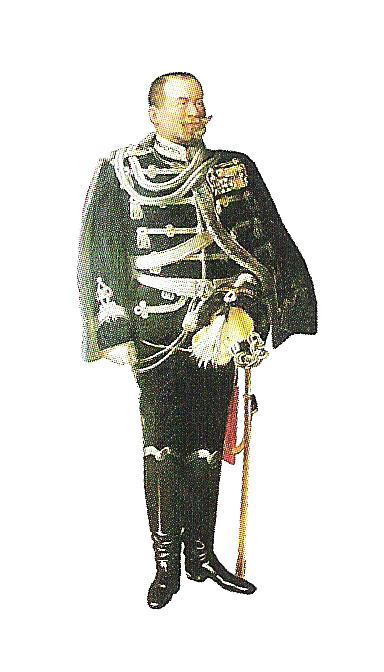 Ölgemälde; Uniform der Wandsbeker Husaren 1905 (Bildinformation: Uniformträger ist der Elberfelder Fabrikant Emil Weyerbusch als Rittmeister der Reserve).